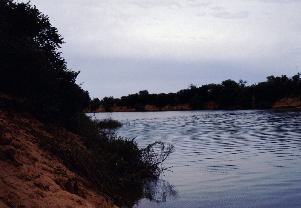 Der Gambia River bei Fatoto